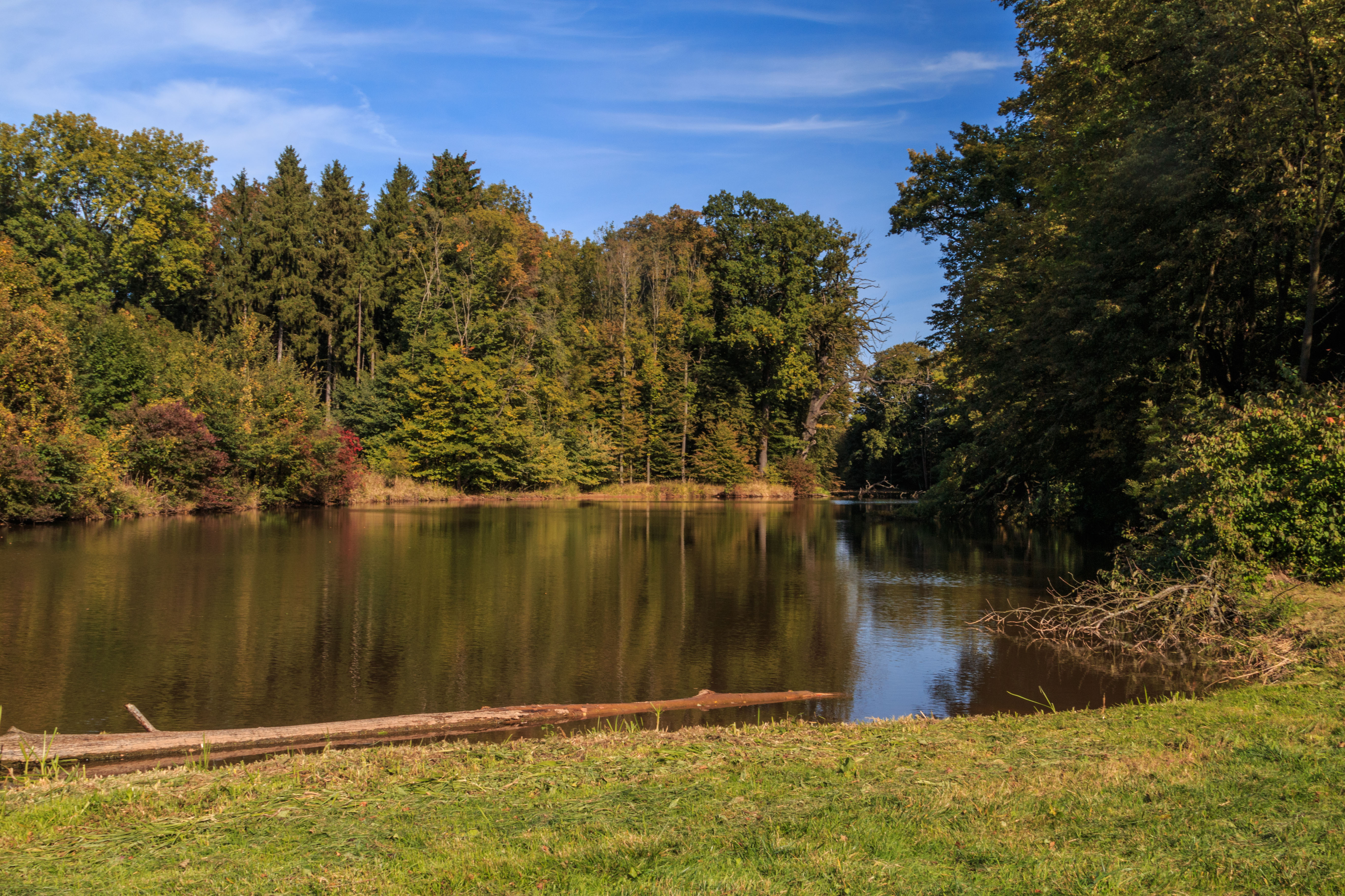 Revitalizovaná ramena Labe v Mošnici Project: Vodstvo.